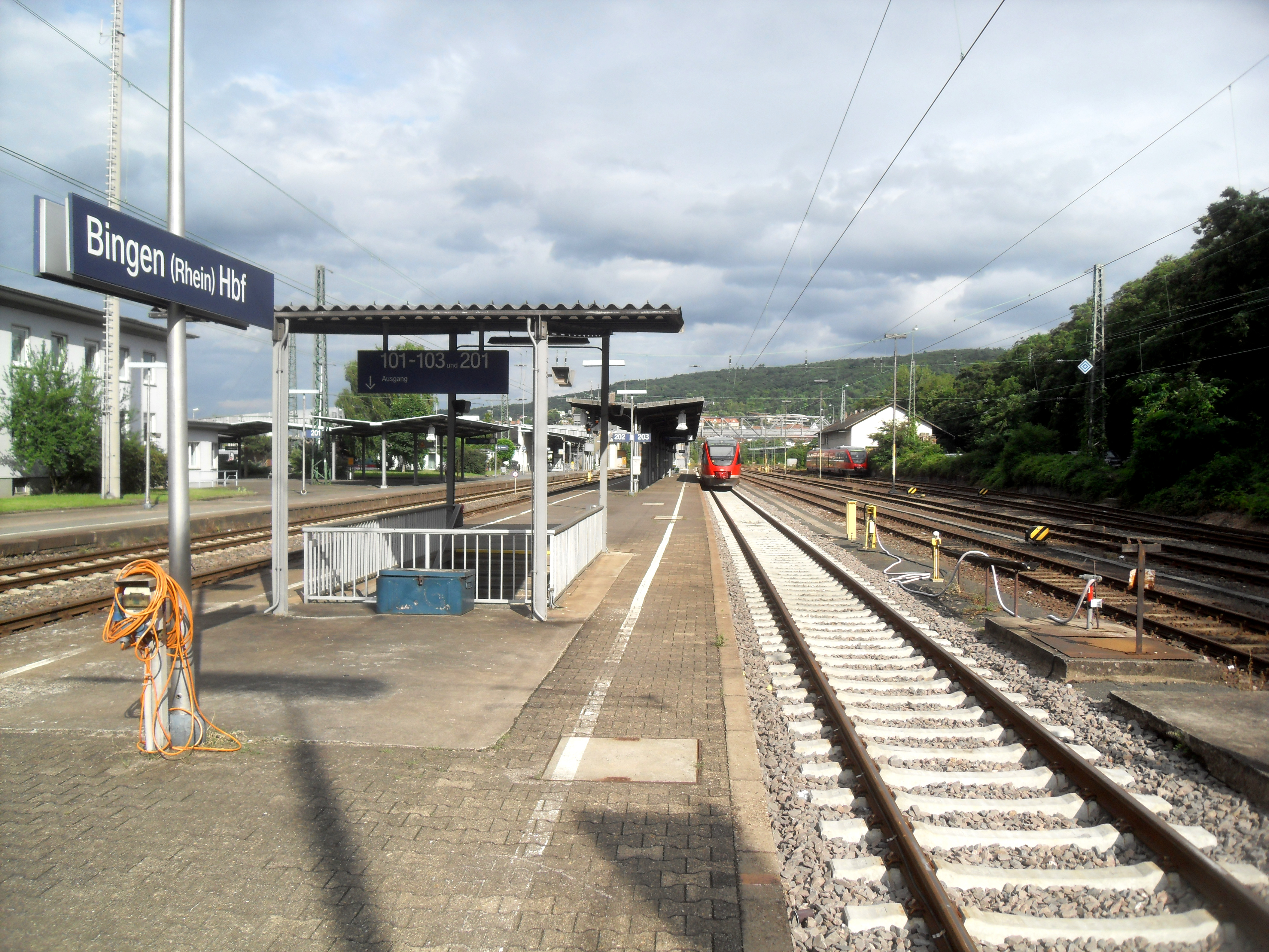 Der Bahnsteig zu den Gleisen 202 und 203 des Hauptbahnhofs von Bingen am Rhein.